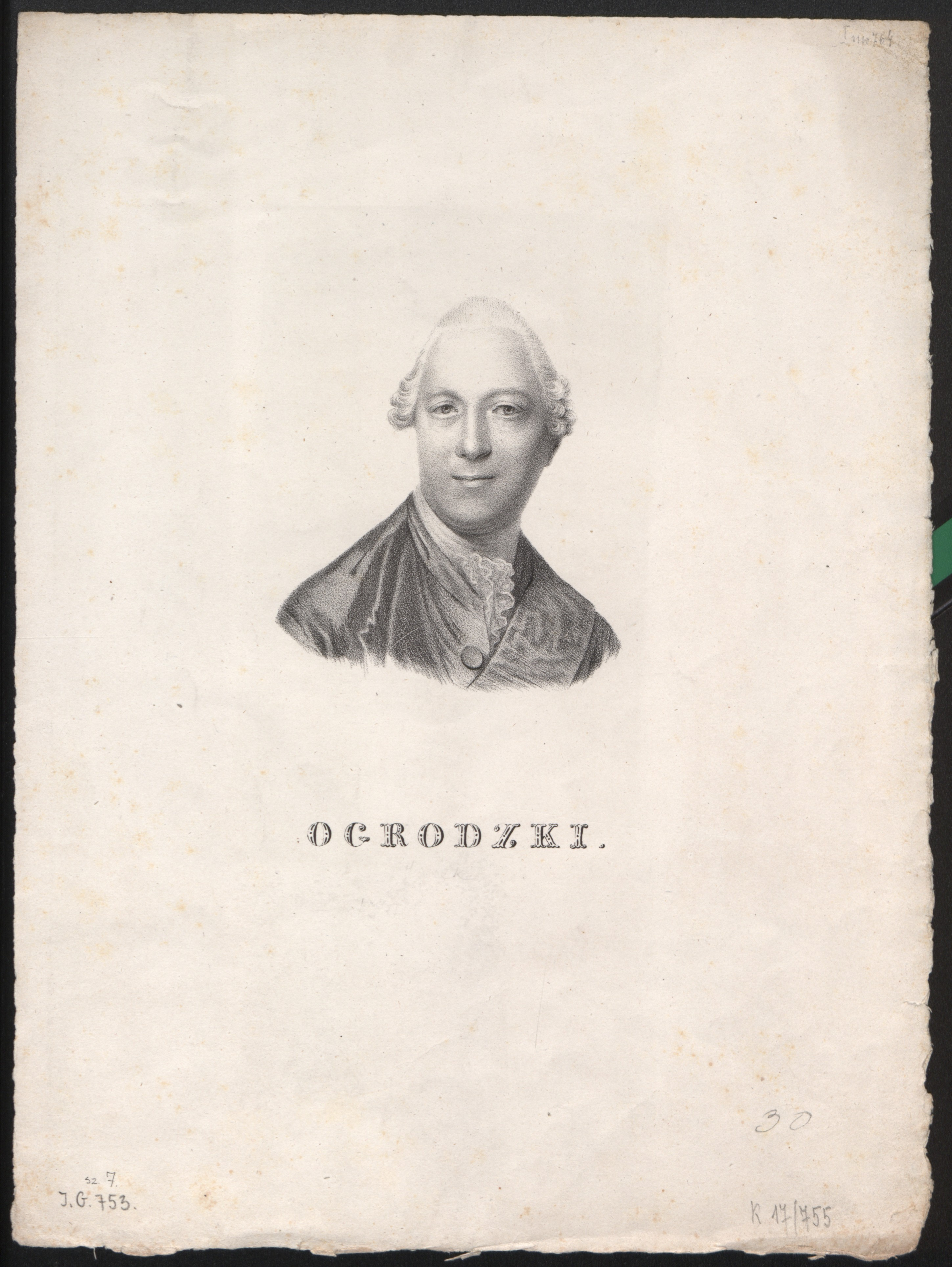 Portret Jacka Ogrodzkiego